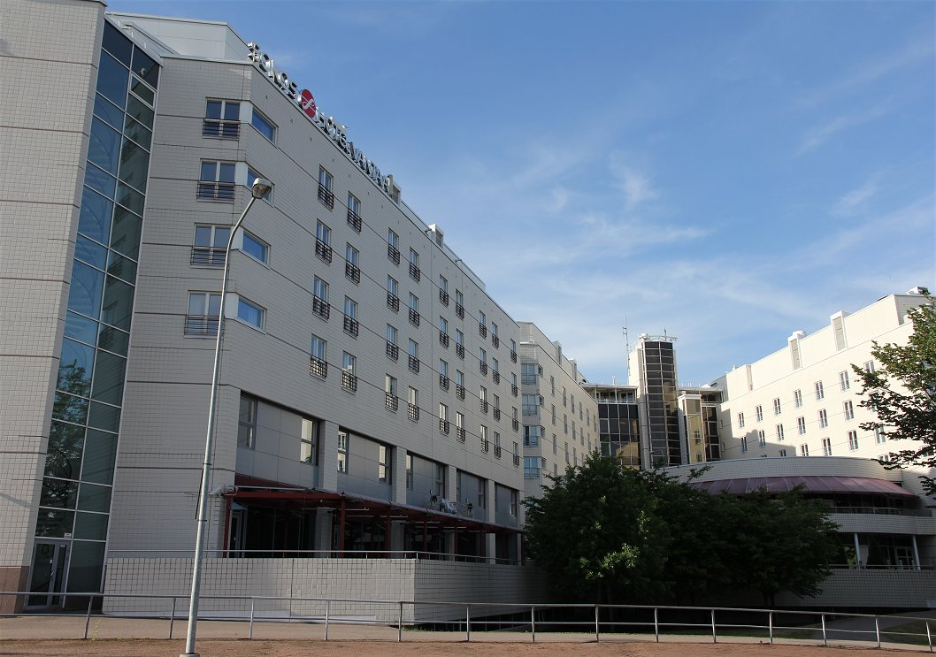 Hotelli Vantaan sisäpihan puoli. Tämä Vantaan Tikkurilassa, Tikkurilan rautatieaseman läheisyydessä sijaitseva suuri hotelli on viralliselta nimeltään Original Sokos Hotel Vantaa. Hotelli tunnetaan muun muassa ravintola Tulisuudelmasta.